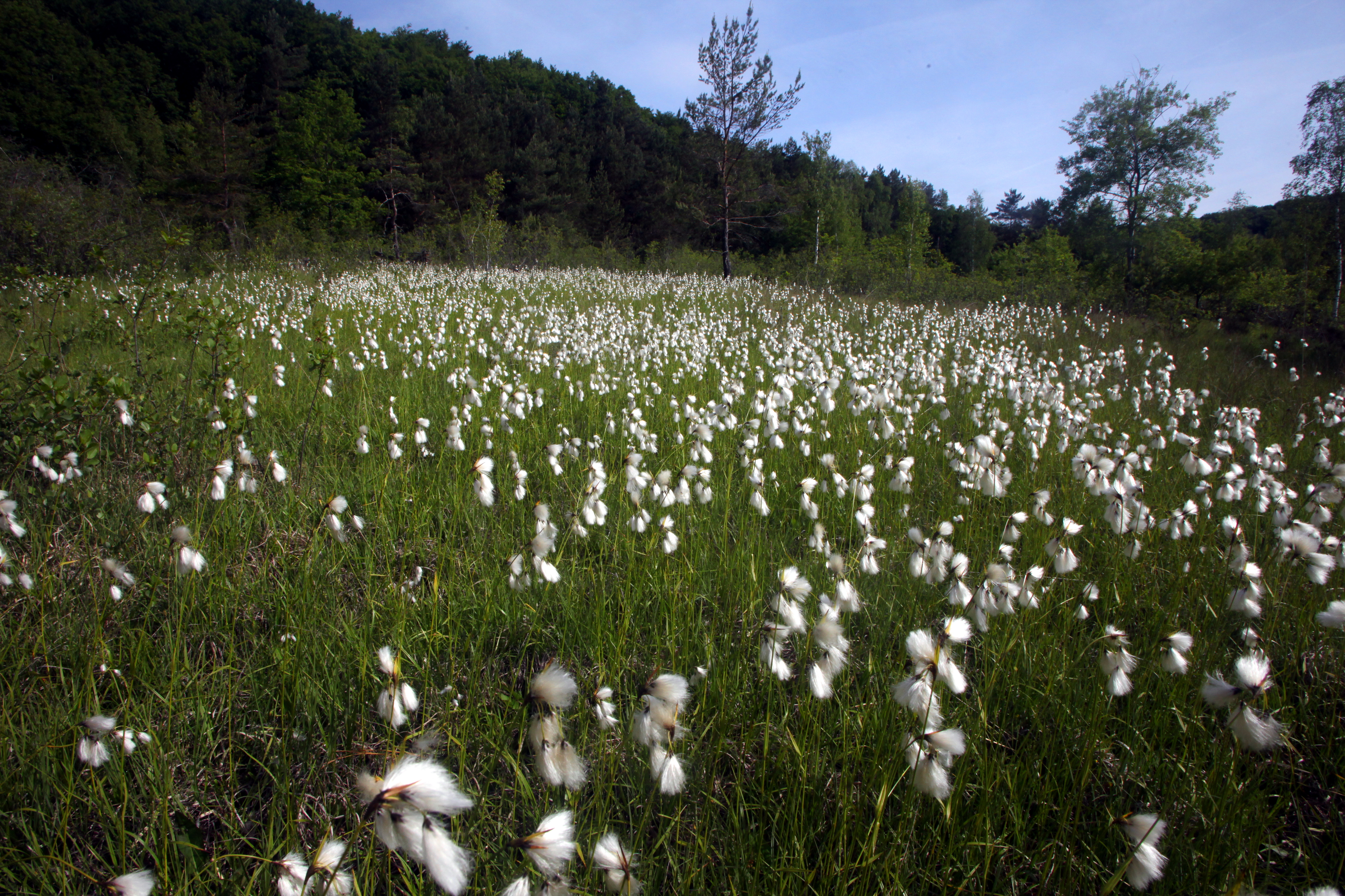 Un champ de linaigrettes à larges feuilles dans la RNR du vallon de Fontenelay.